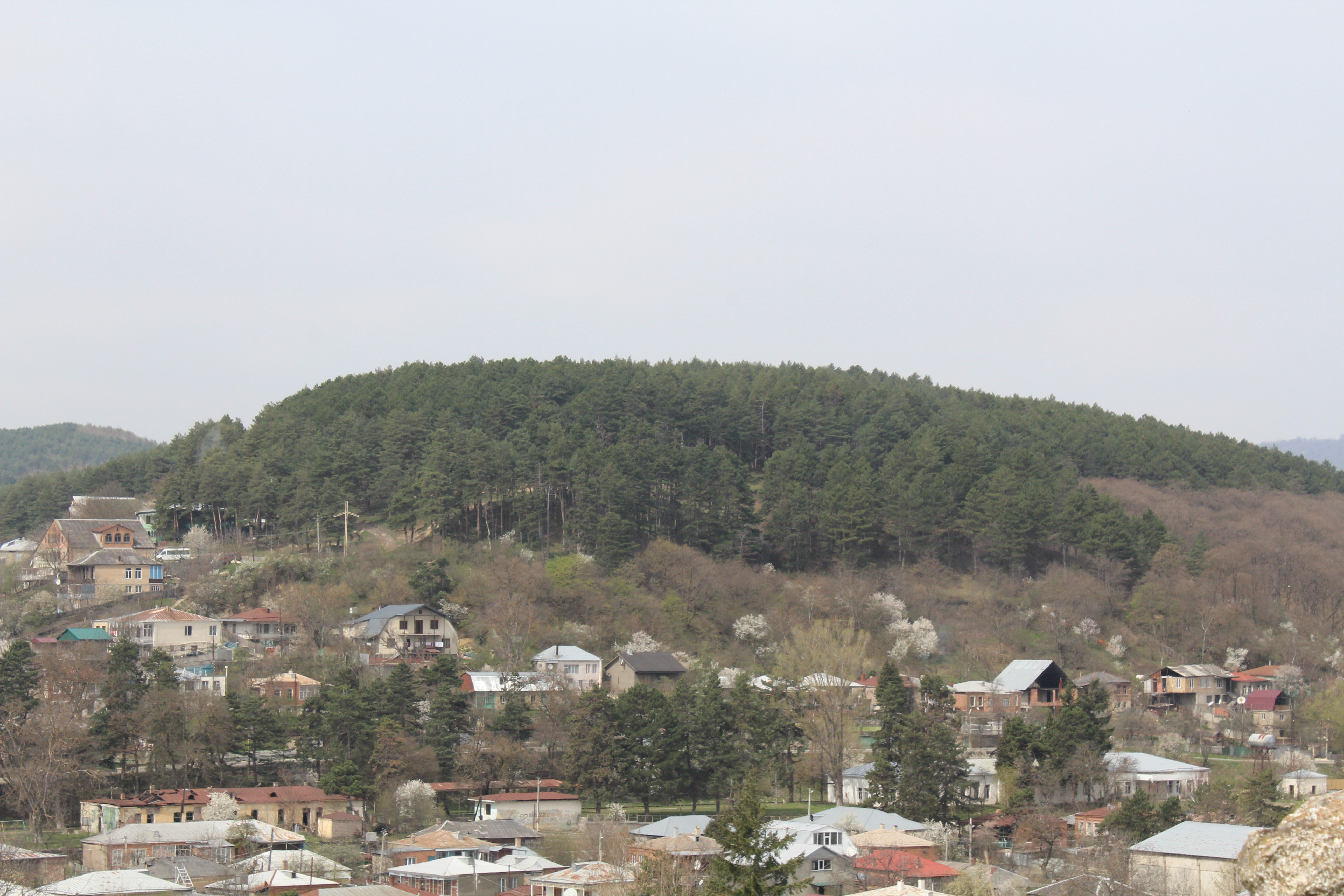 ფიჭვის ტყე სურამთან